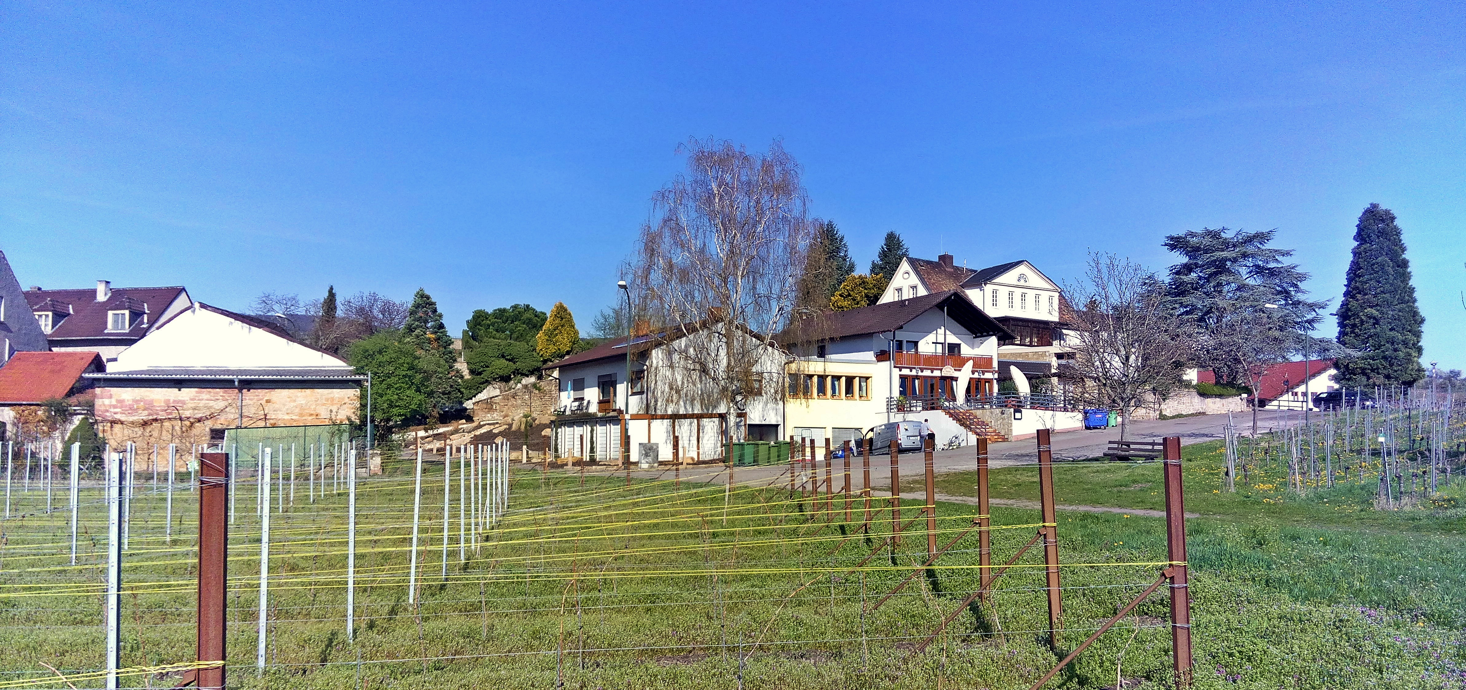 Pfeffingen von der Feldseite (südost)